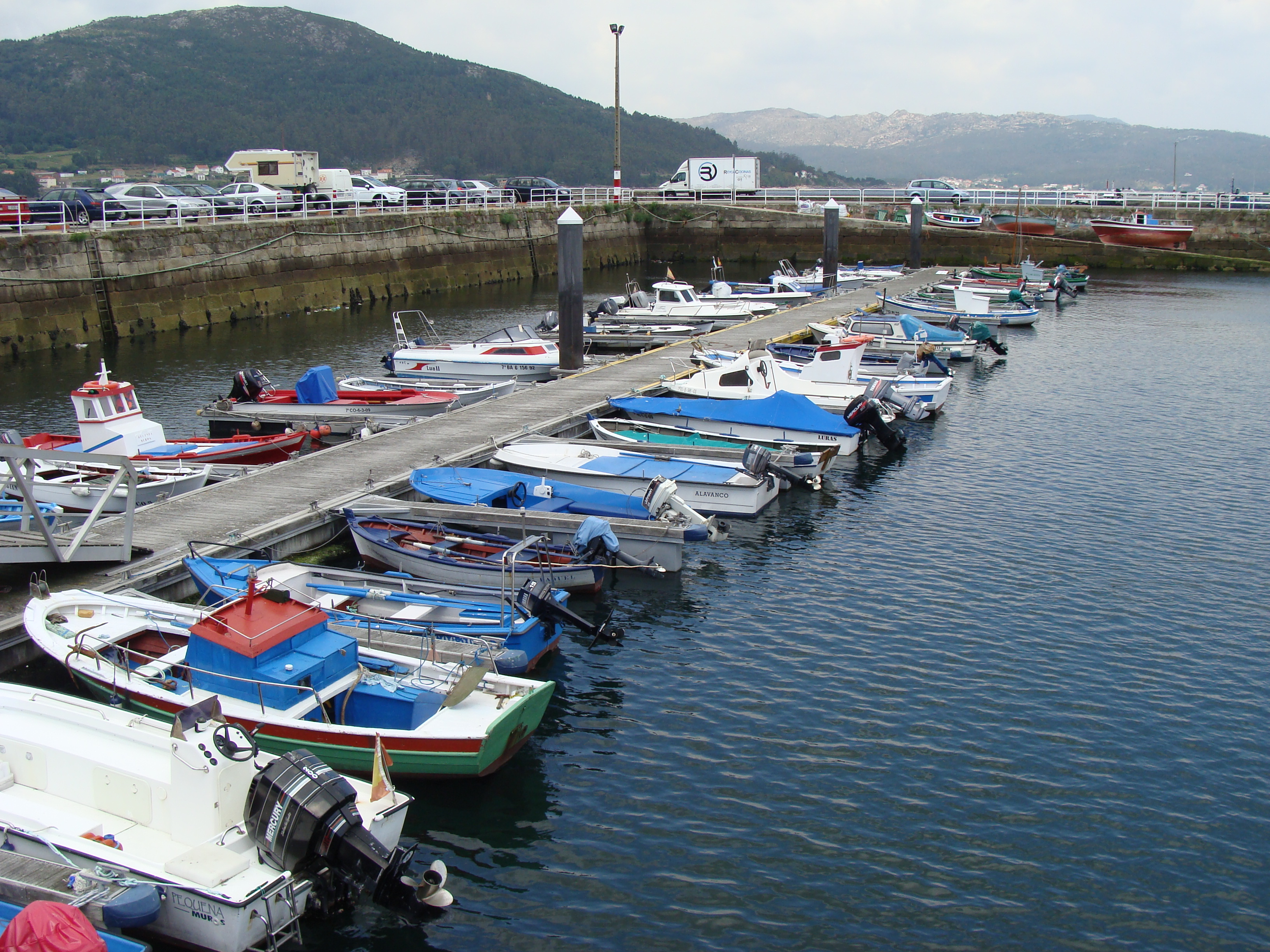 Vista parcial del puerto de Muros (provincia de La Coruña), en marea baja, como puede verse en las marcas en las guías del muelle flotante